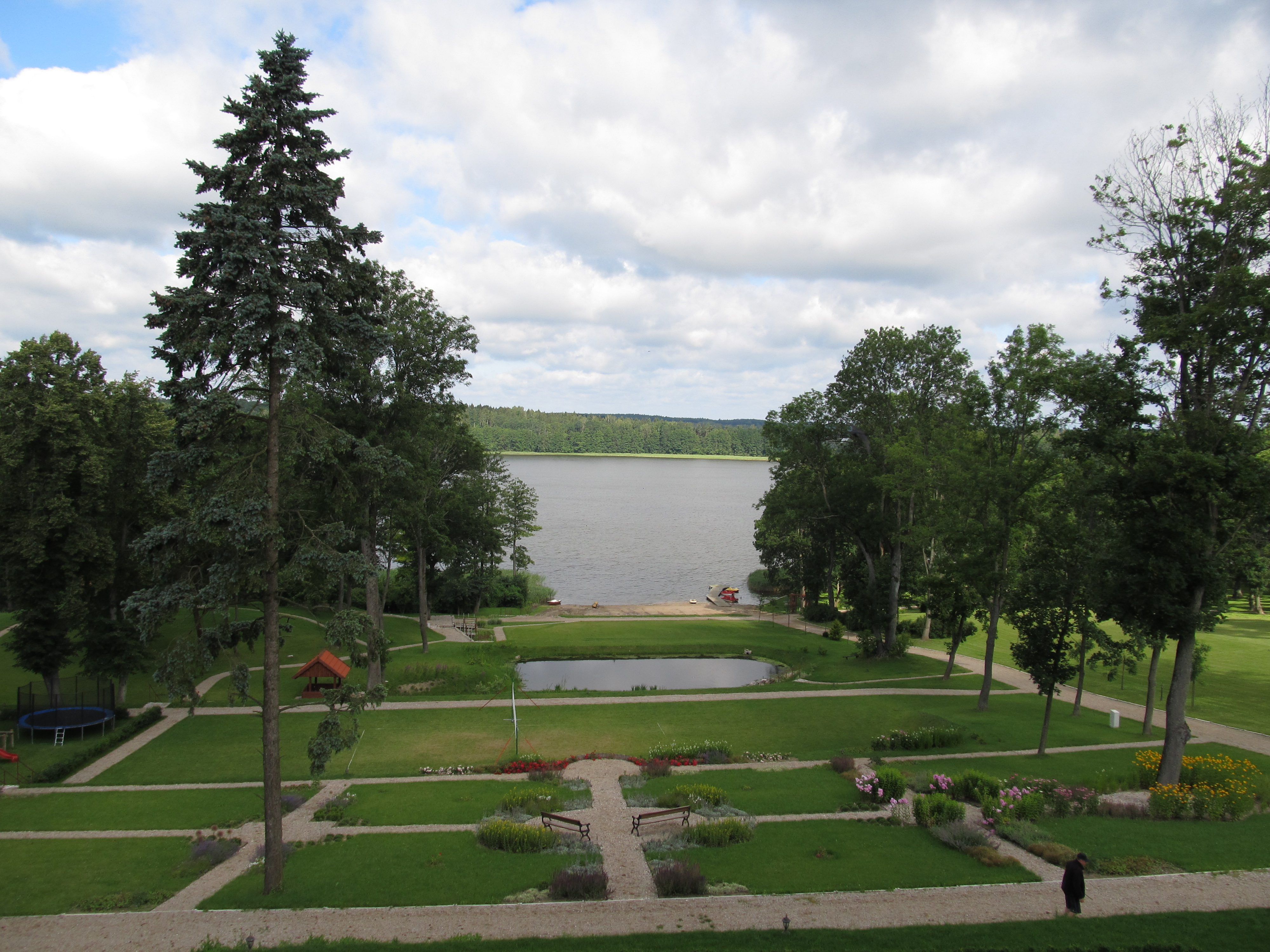 park dworski z przyległym terenem zabudowy mieszkalnej i gospodarczej, Brożówka, Kruklanki, w tle jezioro Brożówka